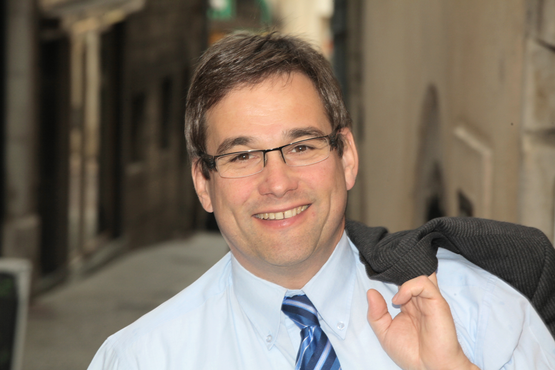 Portrait de Jean-Marie Sermier, député du Jura.